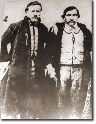 Никола Вардев и Стоян Неделчев Табаков